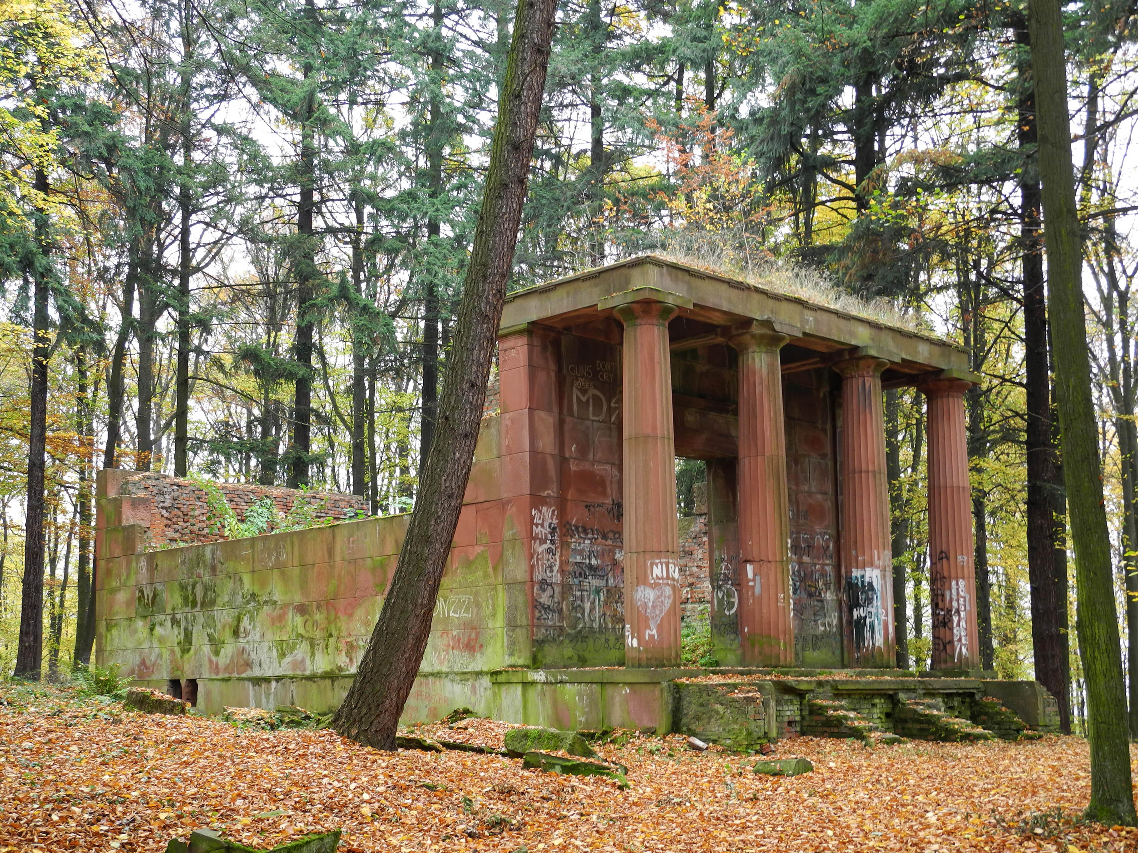 Schlosspark Kamenz in Niederschlesien (Kamieniec Ząbkowicki) - Ruine des ehem. Mausoleums (Nr. 38)